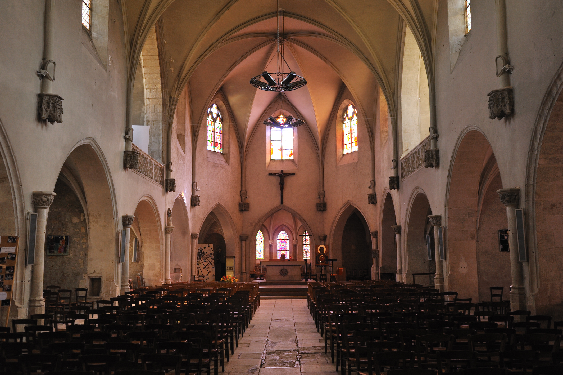 Église Saint-Sauveur, Argenton-sur-Creuse, Indre, France